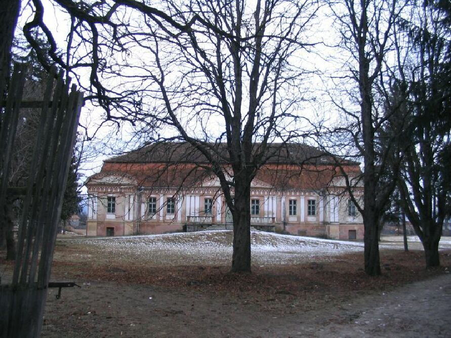 Thúry-Bányai-kúria, Székelytamásfalva, 2006